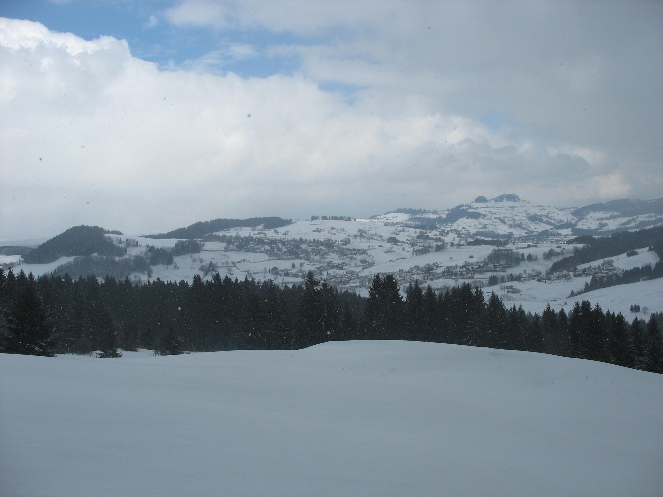 Bild aufgenommen auf einen Gipfel im Senseoberland